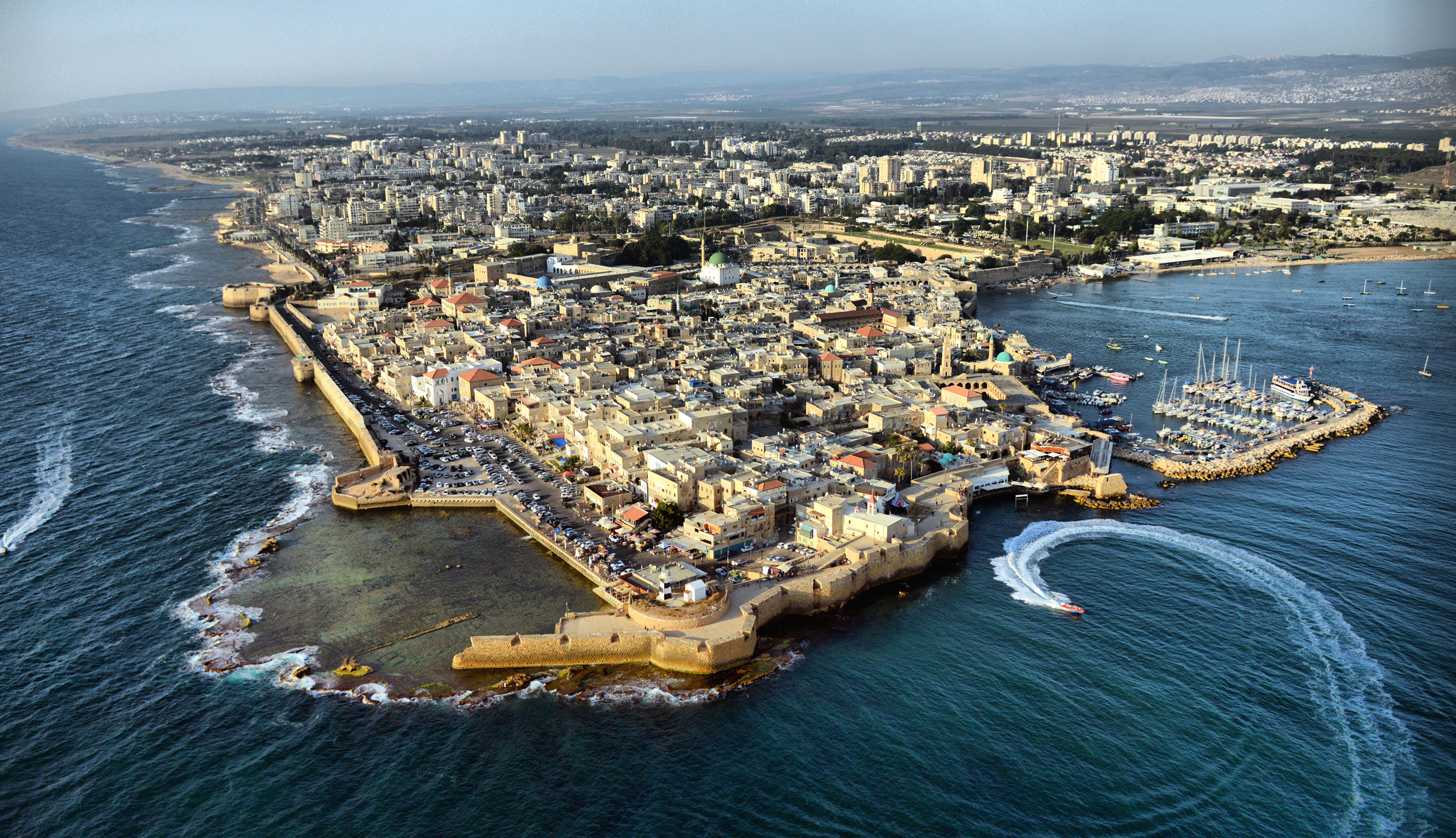 עכו היא אחת מערי הנמל העתיקות בעולם, ודברי ימיה המתועדים מתחילים בתקופת הברונזה הקדומה. במשך שנים רבות הייתה עיר מפתח לכיבוש ארץ ישראל, שכן מיקומה על רצועת החוף הרחבה אפשר גישה נוחה דרך הגליל אל פנים הארץ. היא ידעה עליות ומורדות ועברה מיד ליד פעמים רבות. עכו הגיעה לשיאה כאשר שימשה כבירת ממלכת ירושלים במאה ה-13 וכבירתו של אחמד אל-ג'זאר בסוף המאה ה-18.